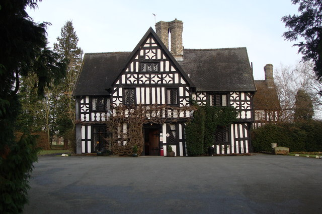 Maesmawr Hall hotel, Powys, Wales